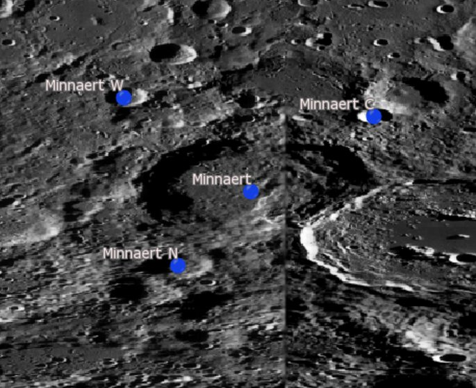 Cráter lunar Minnaert. Cráteres satélite. (Imagen LRO)